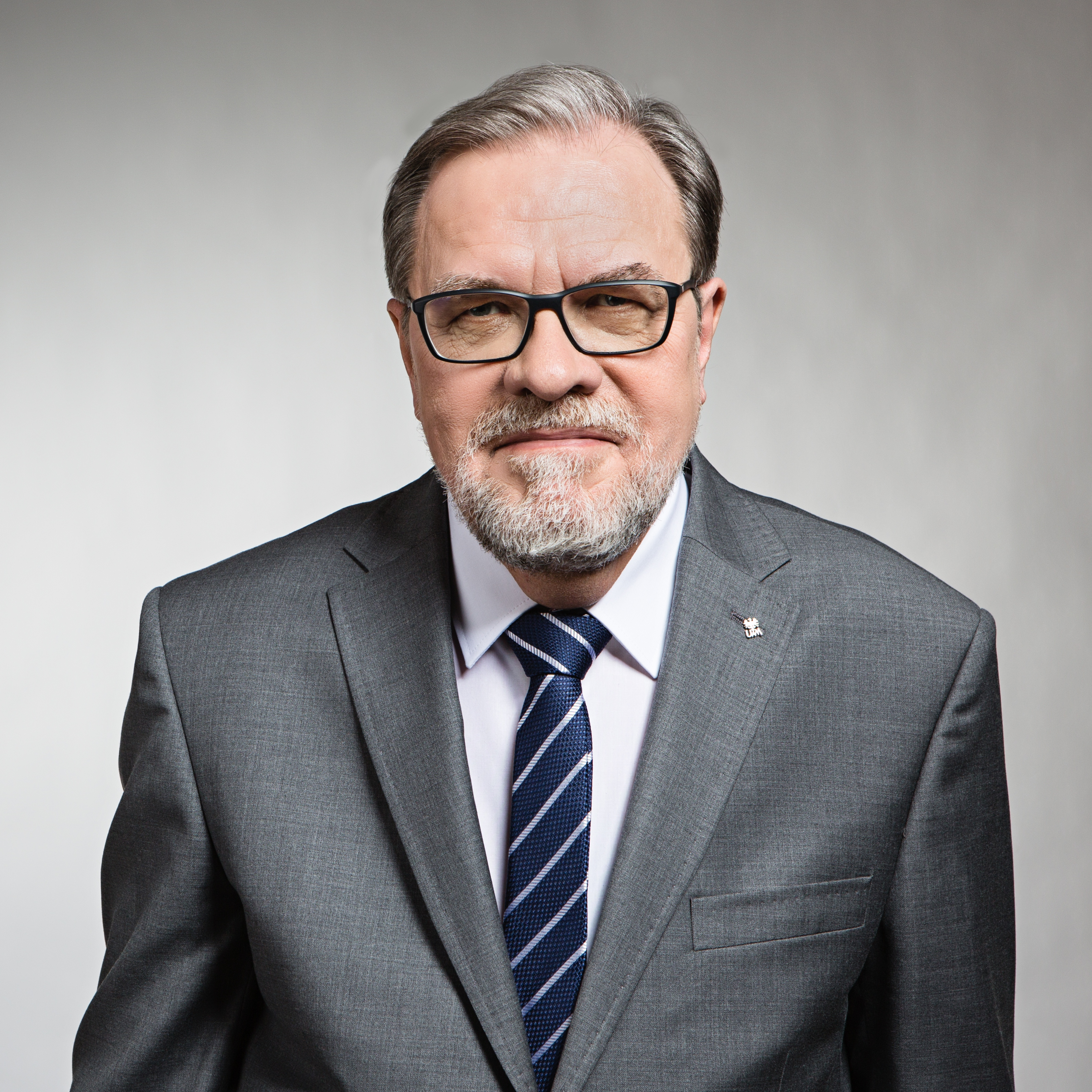 Andrzej Lesicki